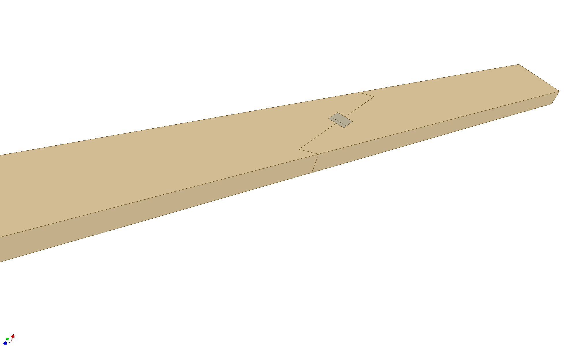 assemblage en trait de jupiter à clef utilisé en charpente